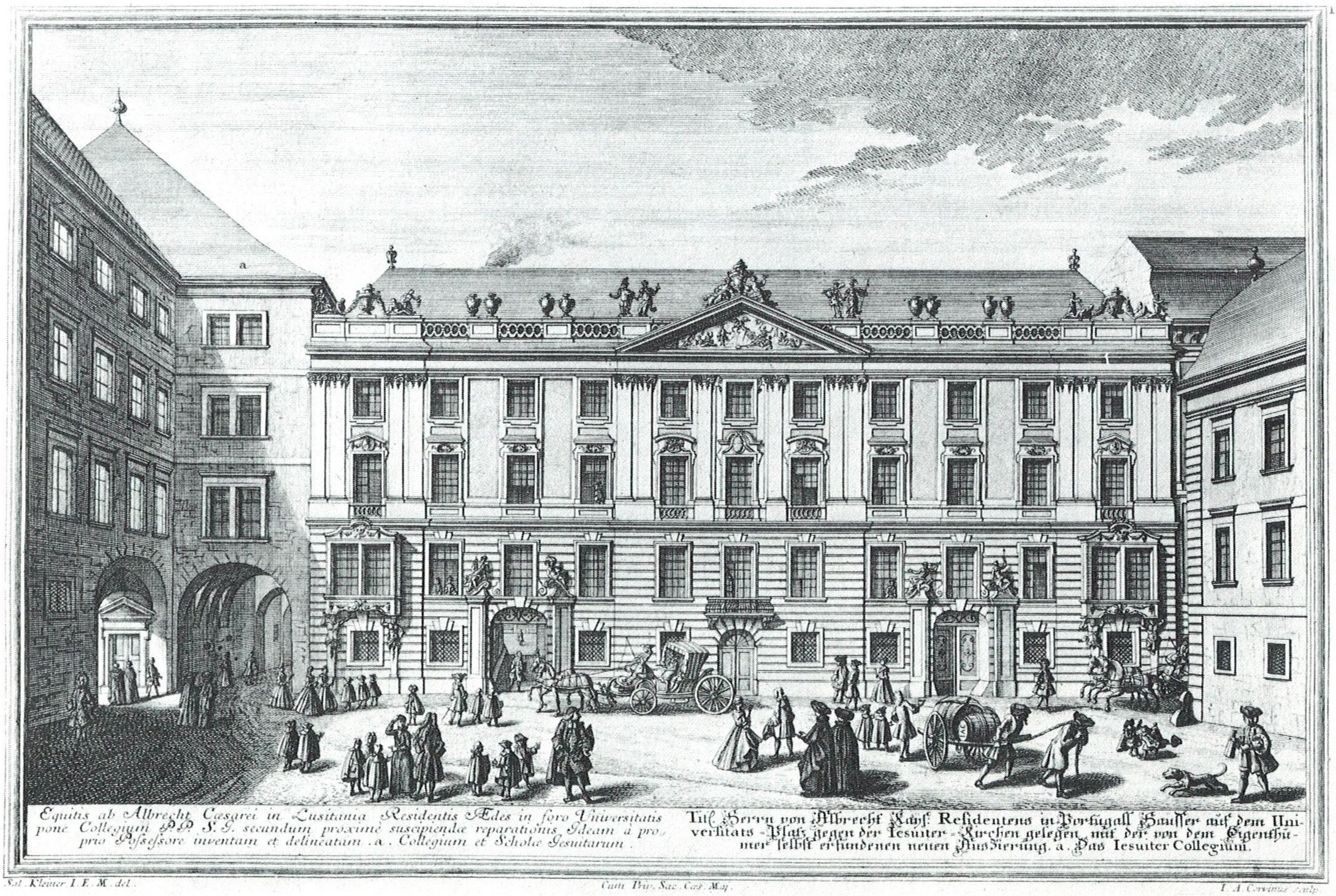 The Palais Albrecht in Vienna's I. district Innere Stadt (Vienna) at Ignaz-Seipel-Platz #3.